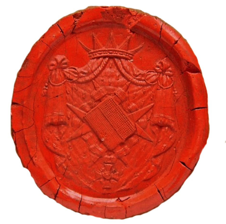 Pečeť - Vratislav Mitrovský - povýšený Ferdinandem II. do panského stavu 1629